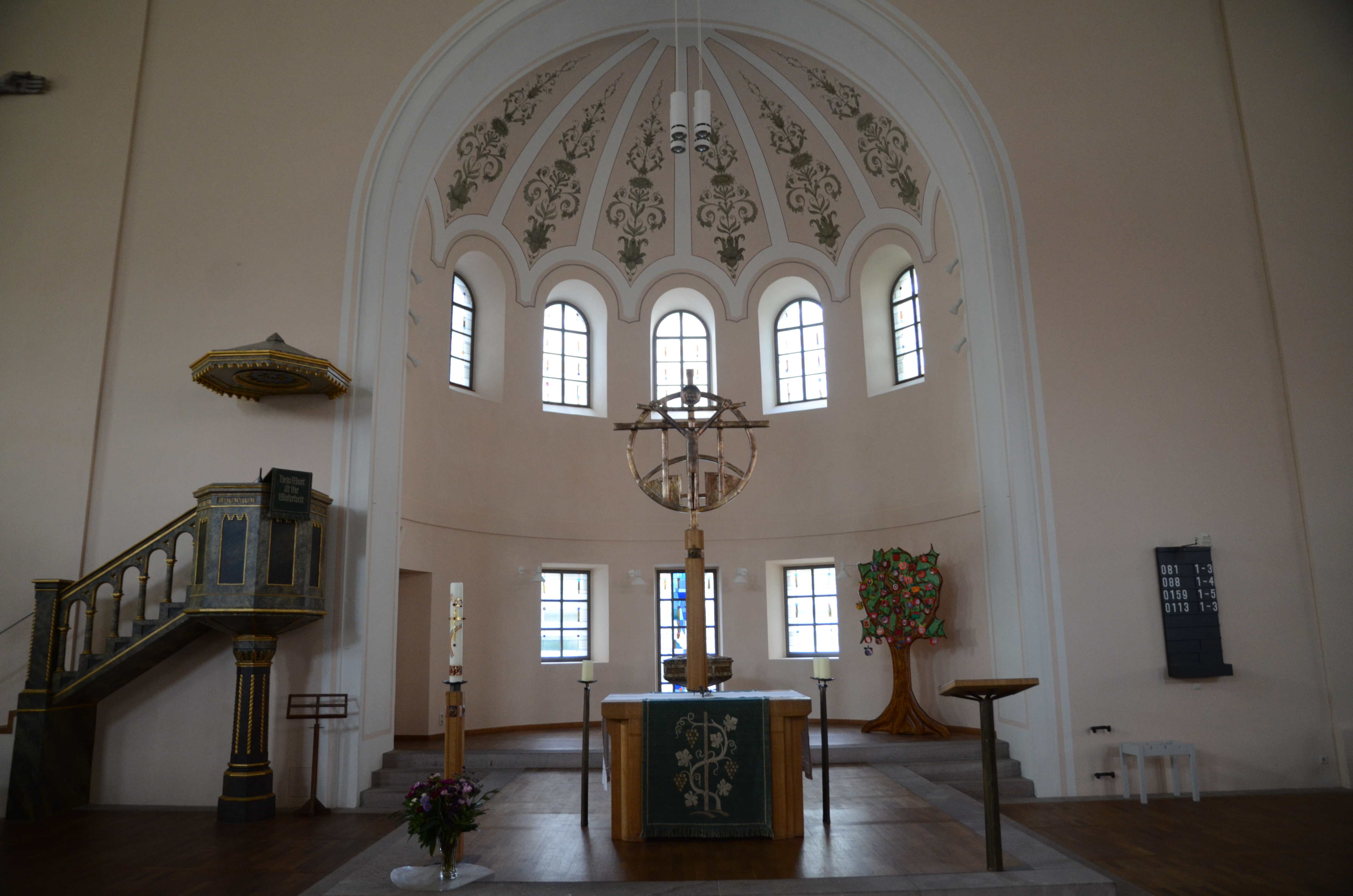 evang.-luth. Kirche St. Paul in Dinkelsbühl